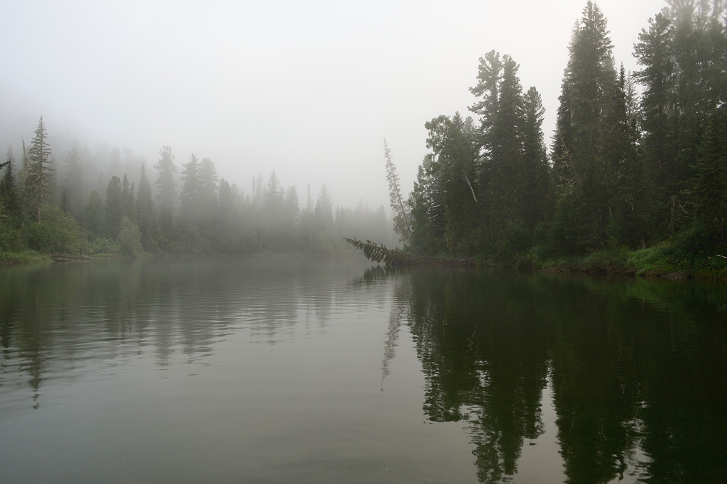 Река Большой Абакан в Хакасском заповеднике. Урочище Тиши.